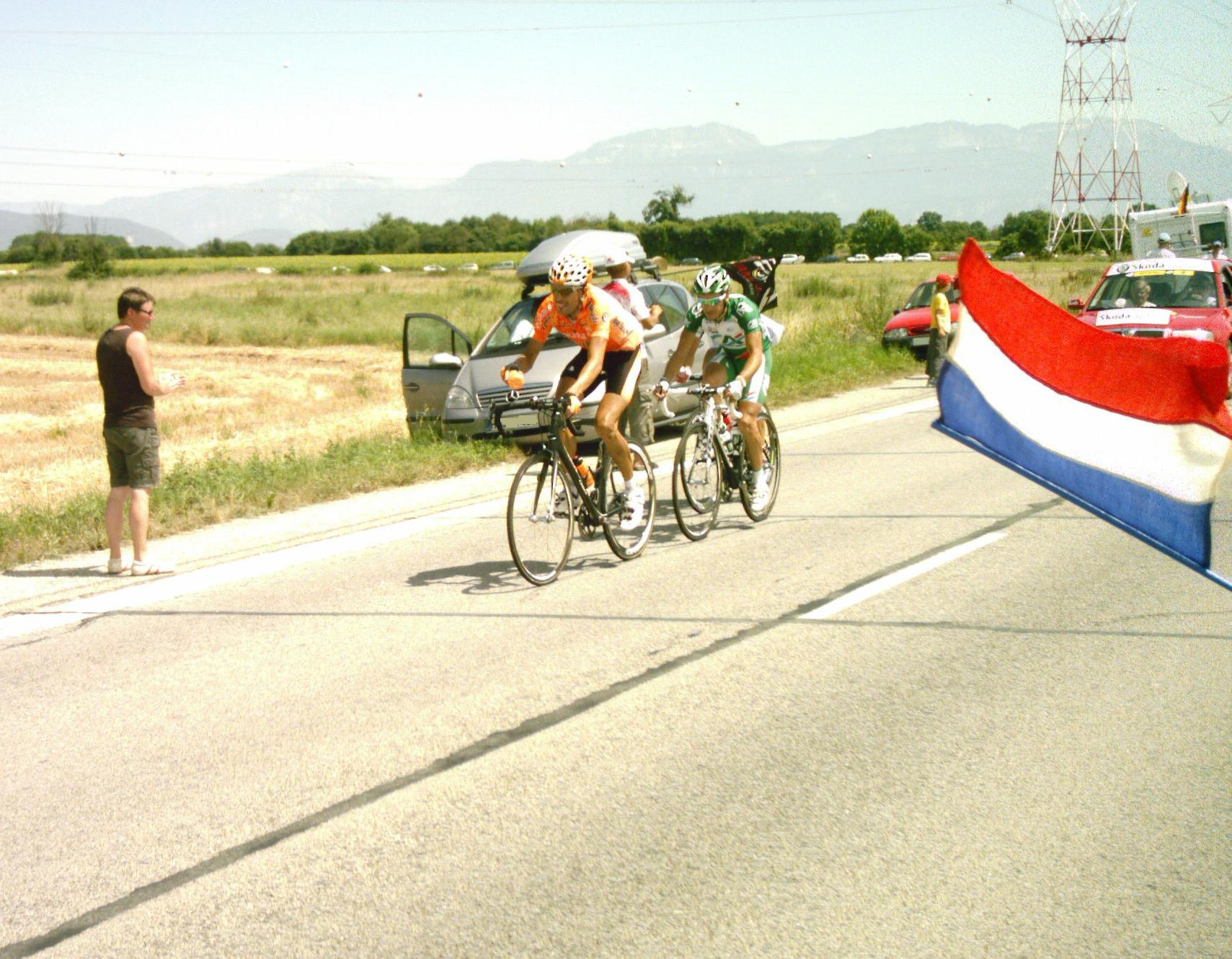 Le groupe de contre, Mikel Astarloza (en premier), Christophe Le Mevel (derrière) et Romain Feillu (caché) dans la zone de ravitaillement lors de la 18e étape du Tour de France 2008.